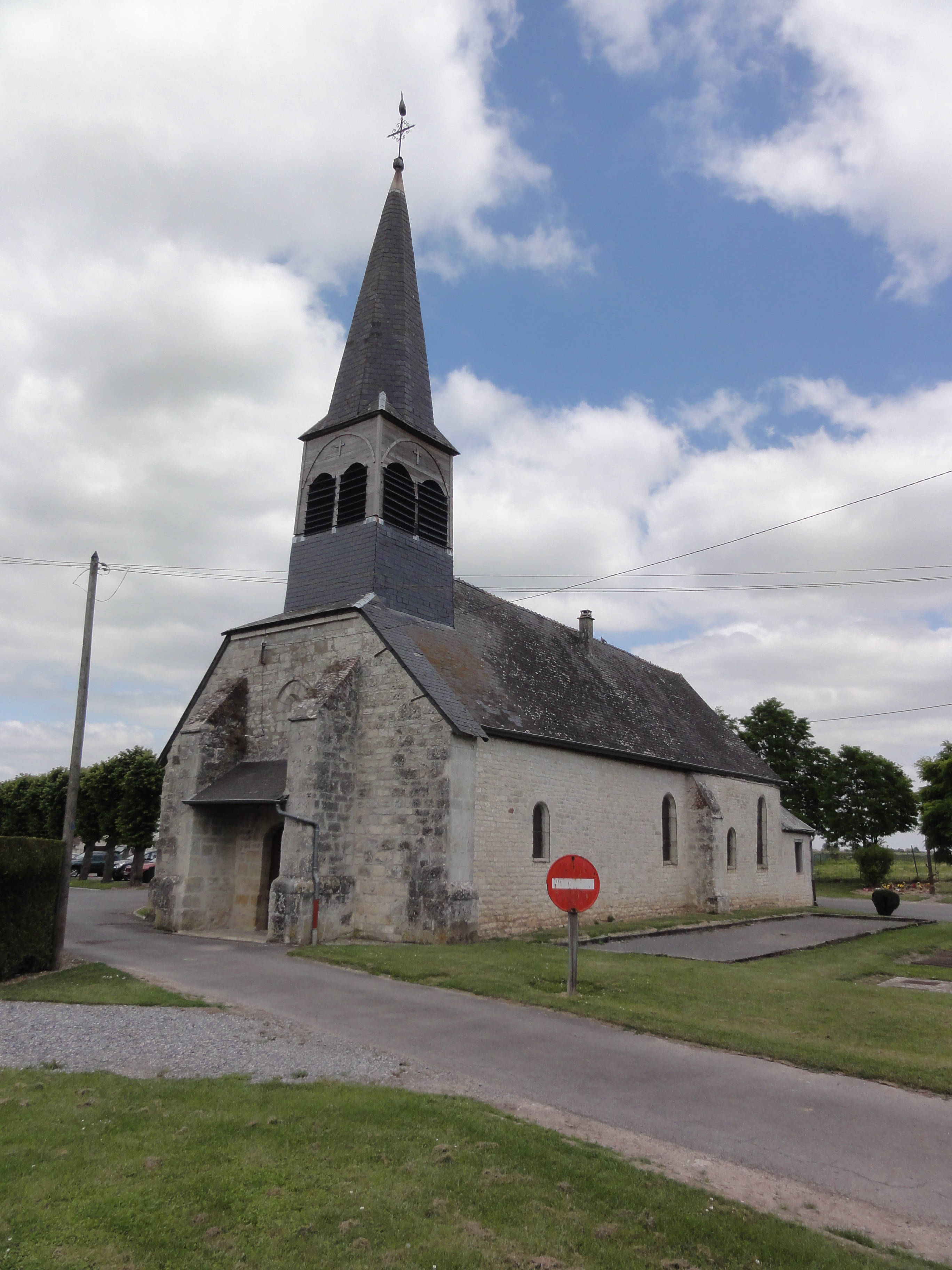 Goudelancourt-lès-Pierrepont (Aisne) église